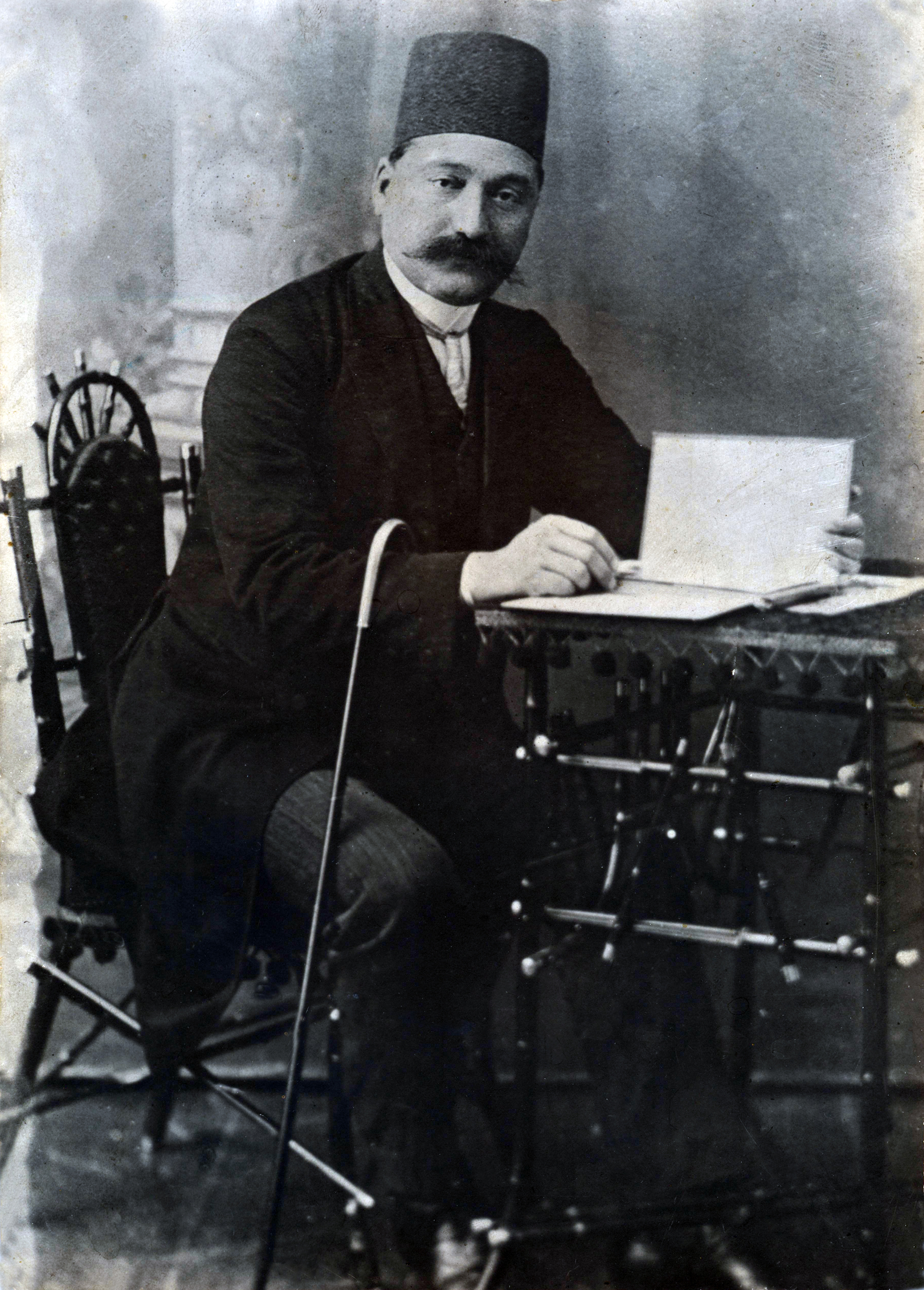 مؤیدالممالک فکری ارشاد نمایشنامه نویس و روزنامه نگار عهد مشروطه و صاحب روزنامه صبح صادق و روزنامه ارشاد.